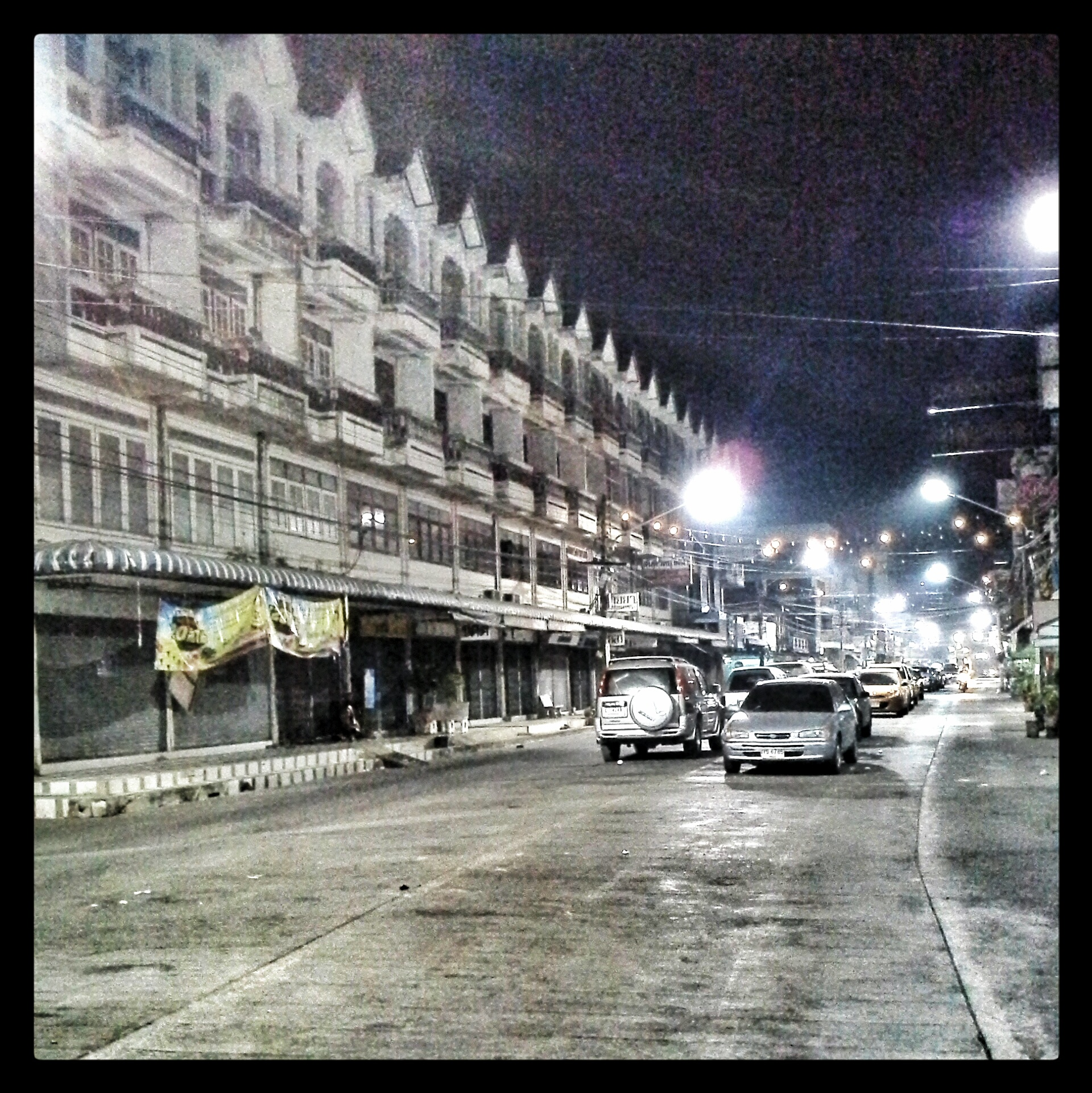 แก่งคอย